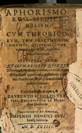 Aphorismorum medicinalium, 1594, Lorenz Scholz von Rosenau (1552-1599)